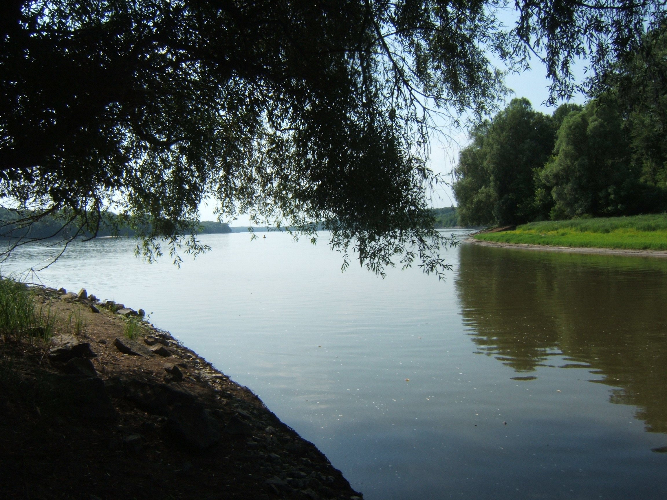 A Sió torkolata